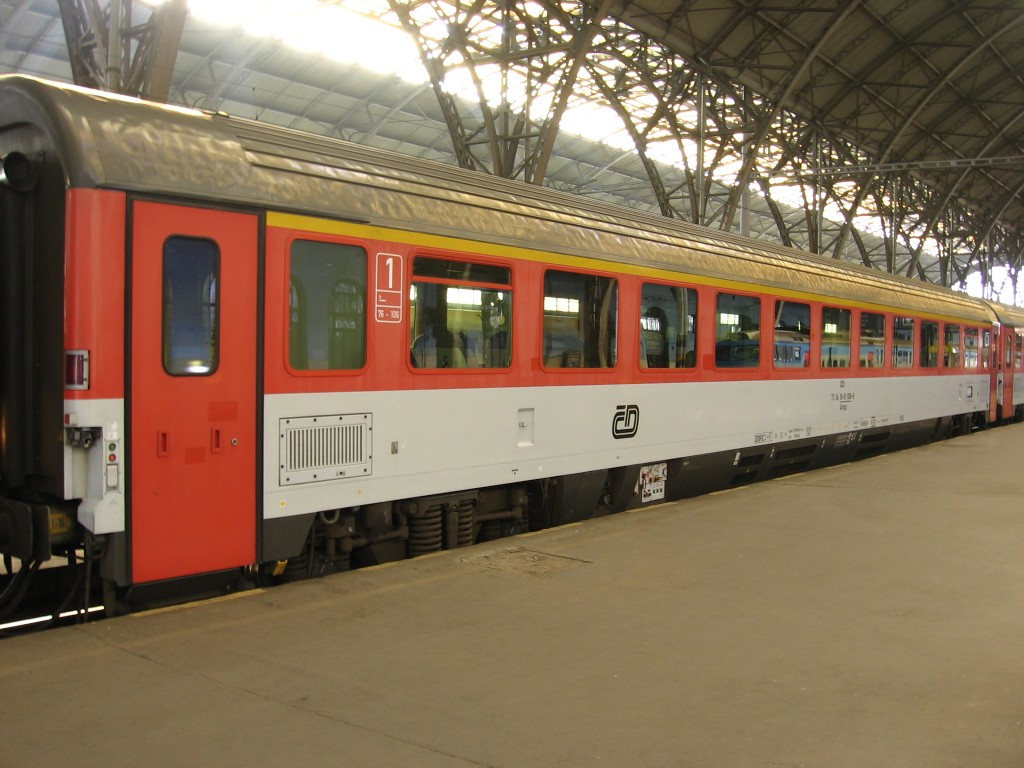 Velkoprostorvý osobní vůz 1. třídy Českých drah řady Ampz zachycený dne 19. října 2005 na soupravě EC 176 ve stanici Praha hlavní nádraží.